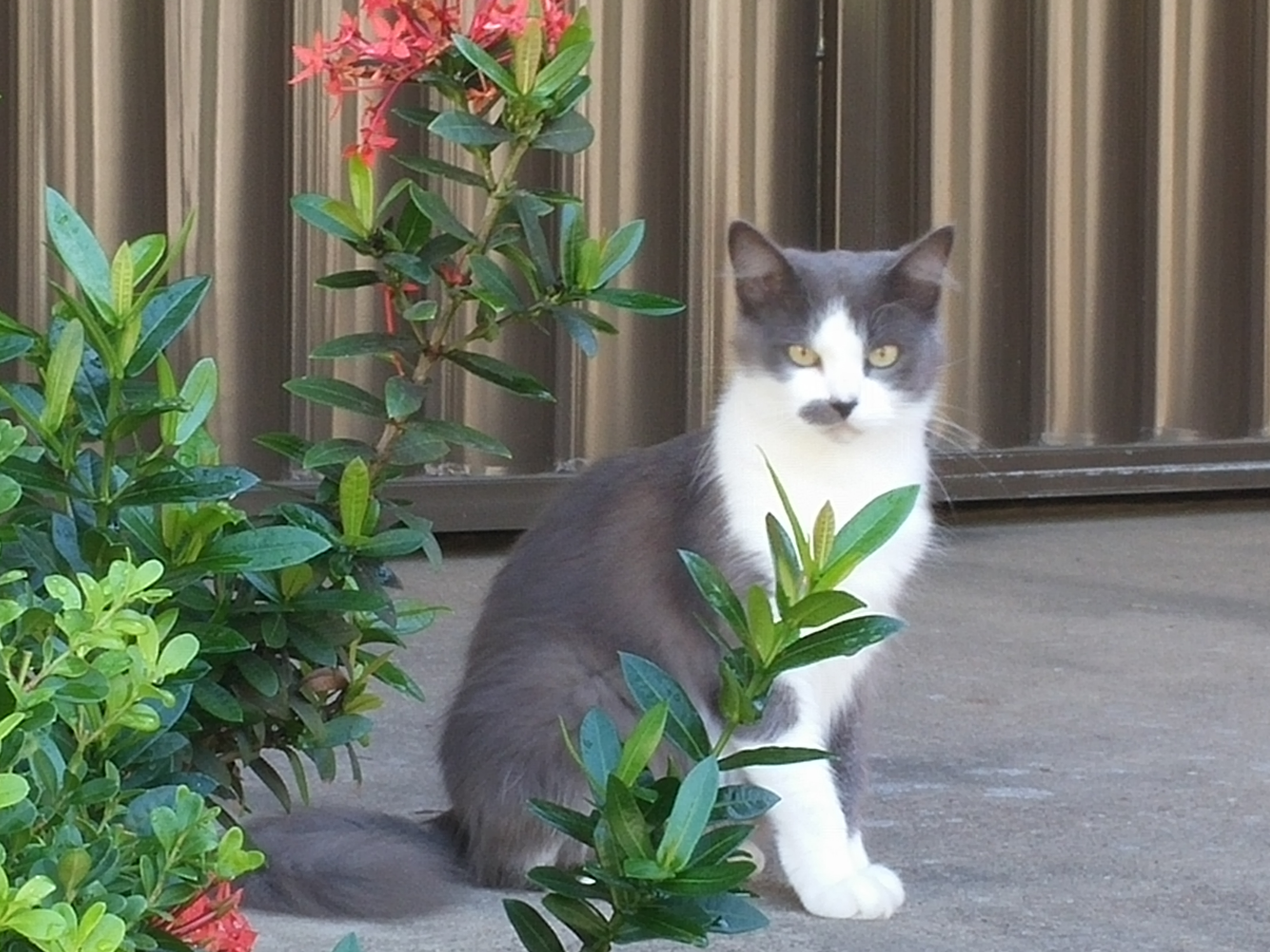 Gato exótico em Santa Leopoldina